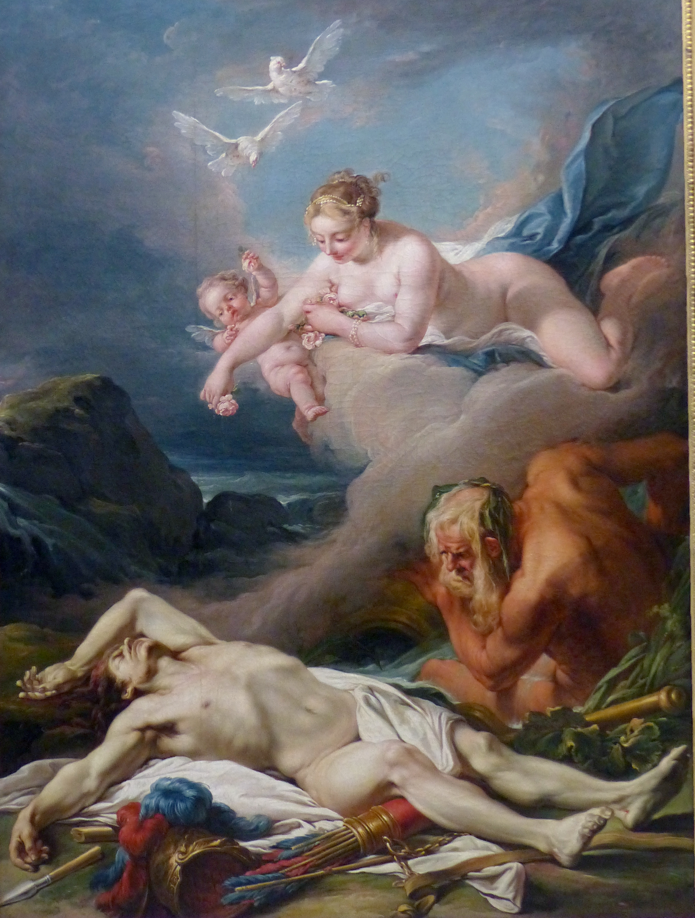 Morceau de réception à l'Académie Royale de peinture et de sculpture en 1759.